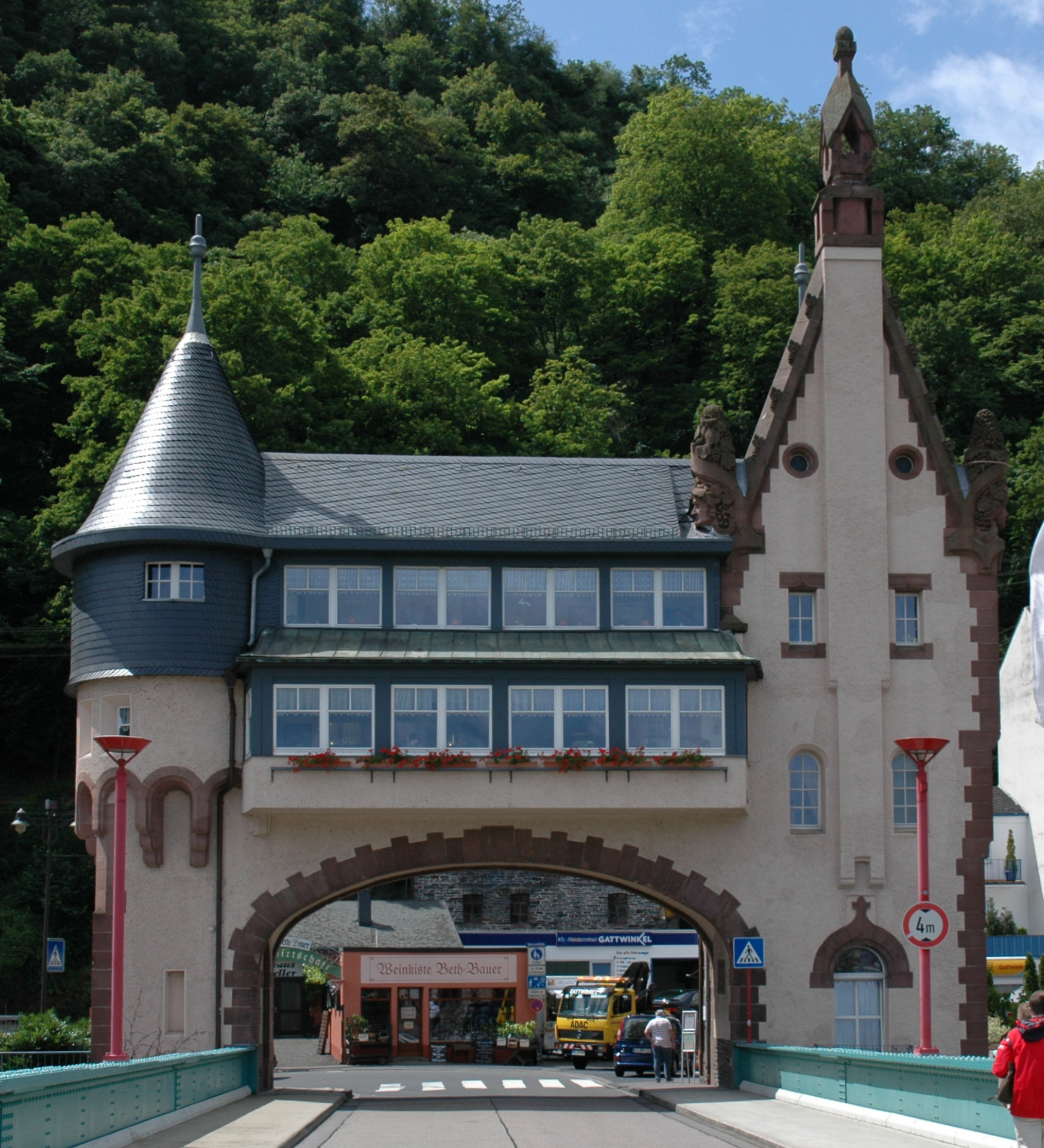 Brückentor in Traben-Trarbach This is a photograph of an architectural monument. It is on the list of cultural monuments of Traben-Trarbach